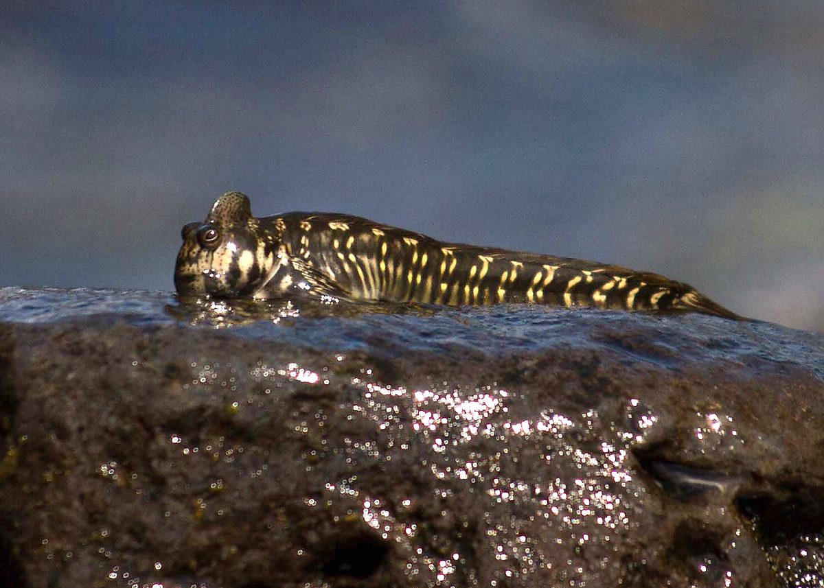 Blennie amphibie (Alticus anjouanae) à la Réunion.